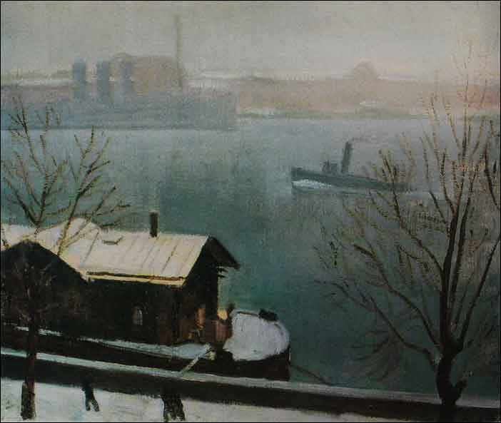 Лапшин Николай Фёдорович. Нева. Первый снег 1934 г. х.,м. 62,5х74